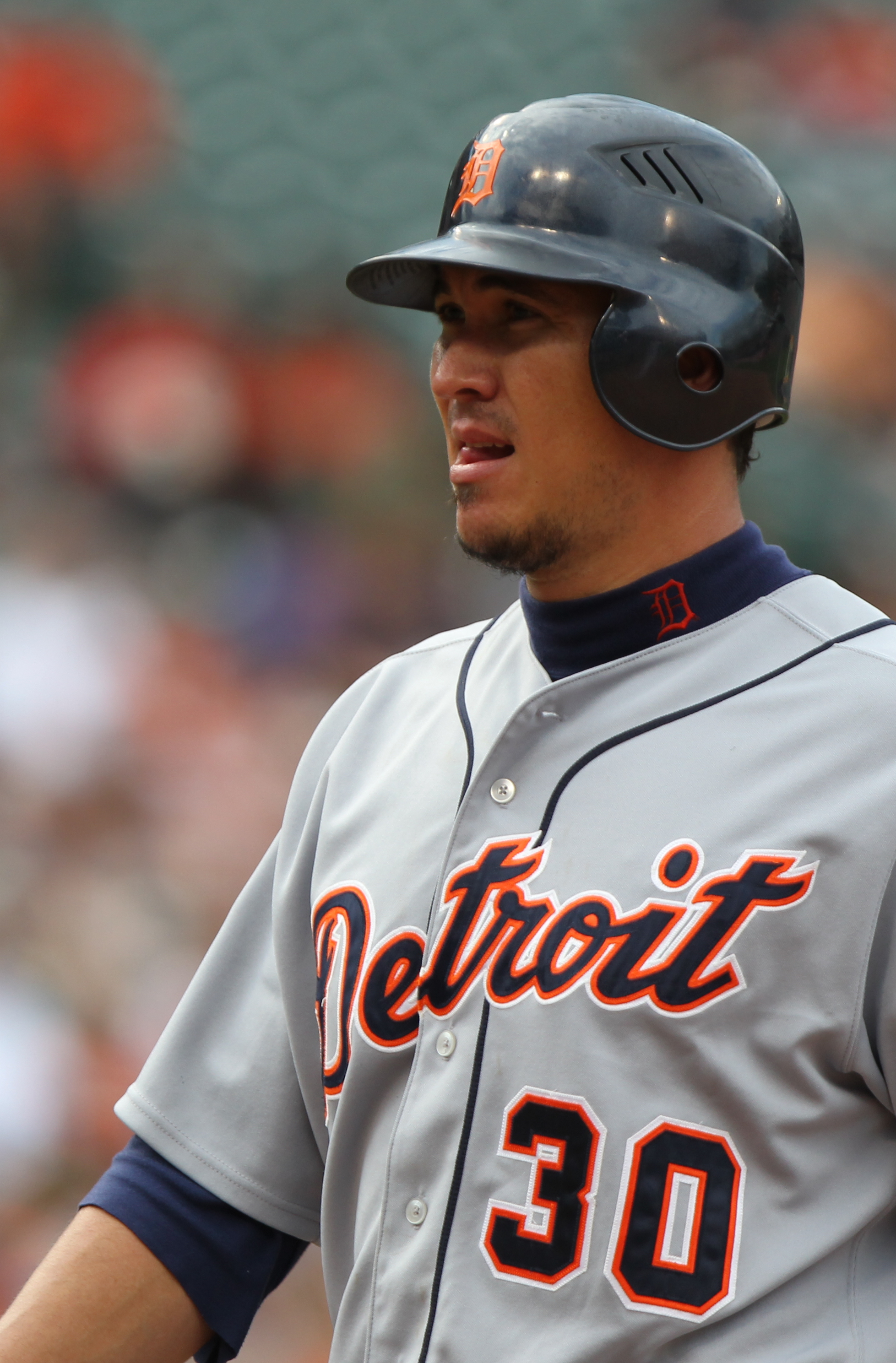 Detroit Tigers batter Magglio Ordóñez during a game on August 14, 2011.